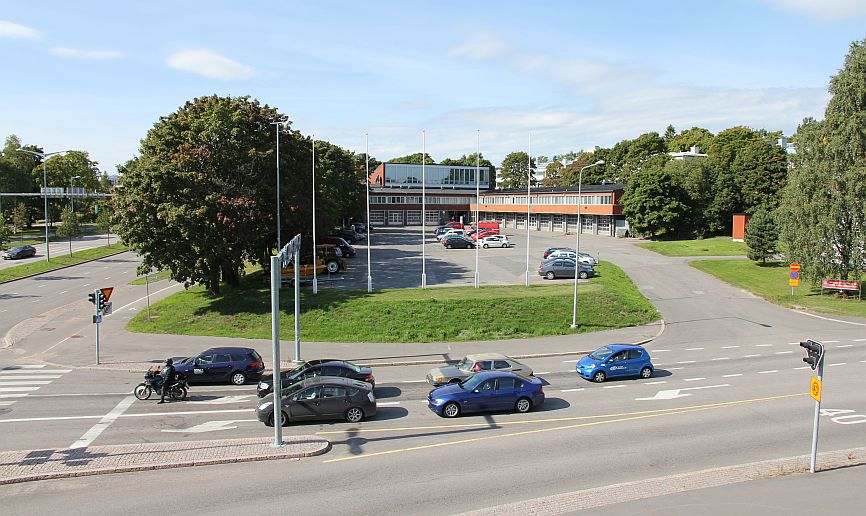 Haagan pelastusasema Helsingin Etelä-Haagassa. Kuvan vasemmassa laidassa on Vihdintien alkupäätä. Huom: Muista säilyttää viittaus kuvaajaan, mikäli käytät kuvaa.